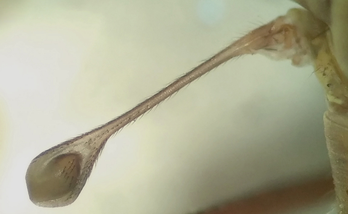 Left halter of Tipula freidbergi